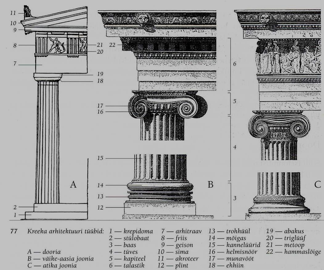 Samba osad